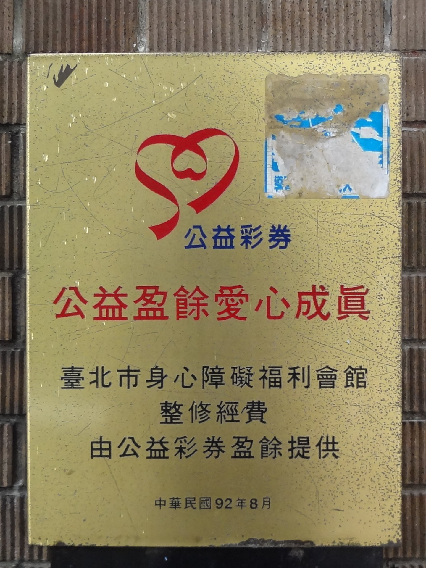 臺北市身心障礙福利會館一期古蹟會館（臺北市中山區長安西路15號）大門前的「公益盈餘愛心成真」紀念牌，2003年8月立，頂端為中華民國公益彩券第一代標誌。